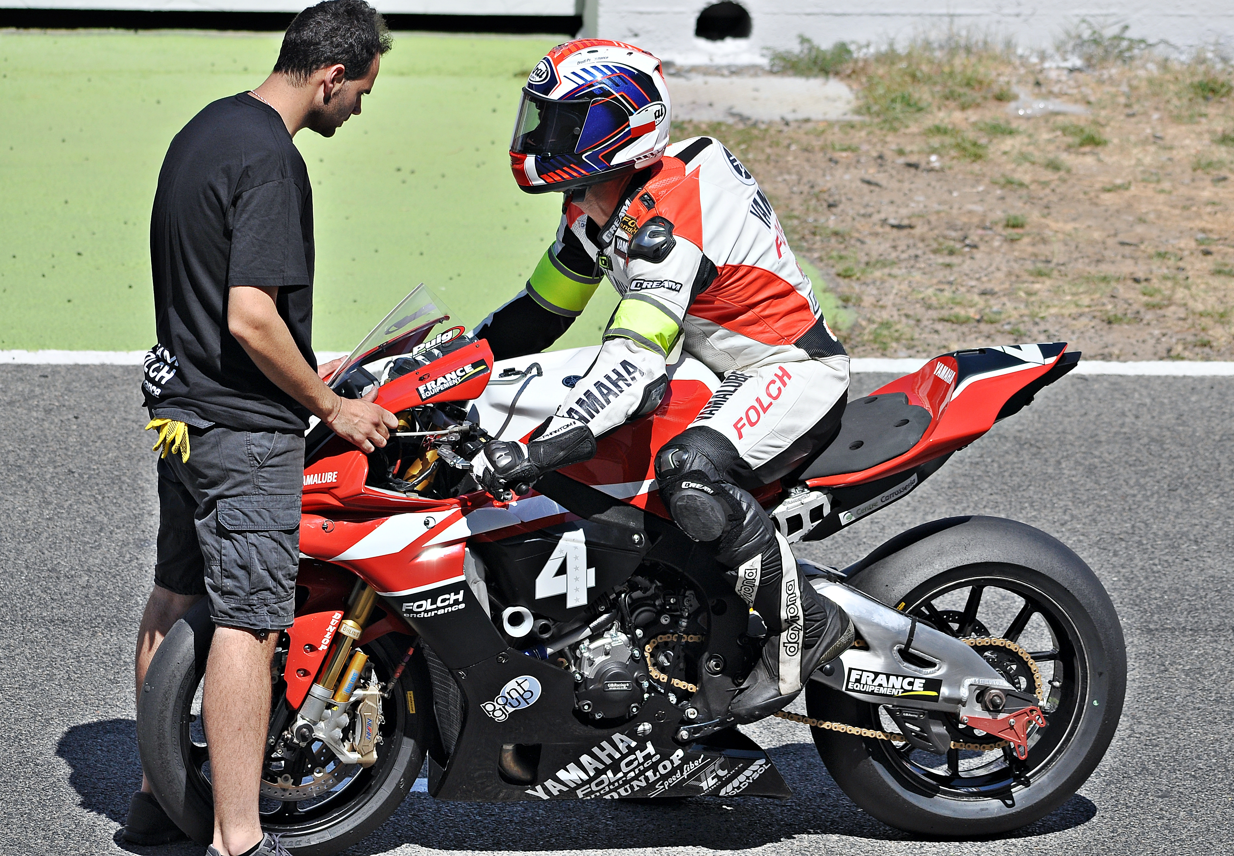 24 Horas de Catalunya 2016